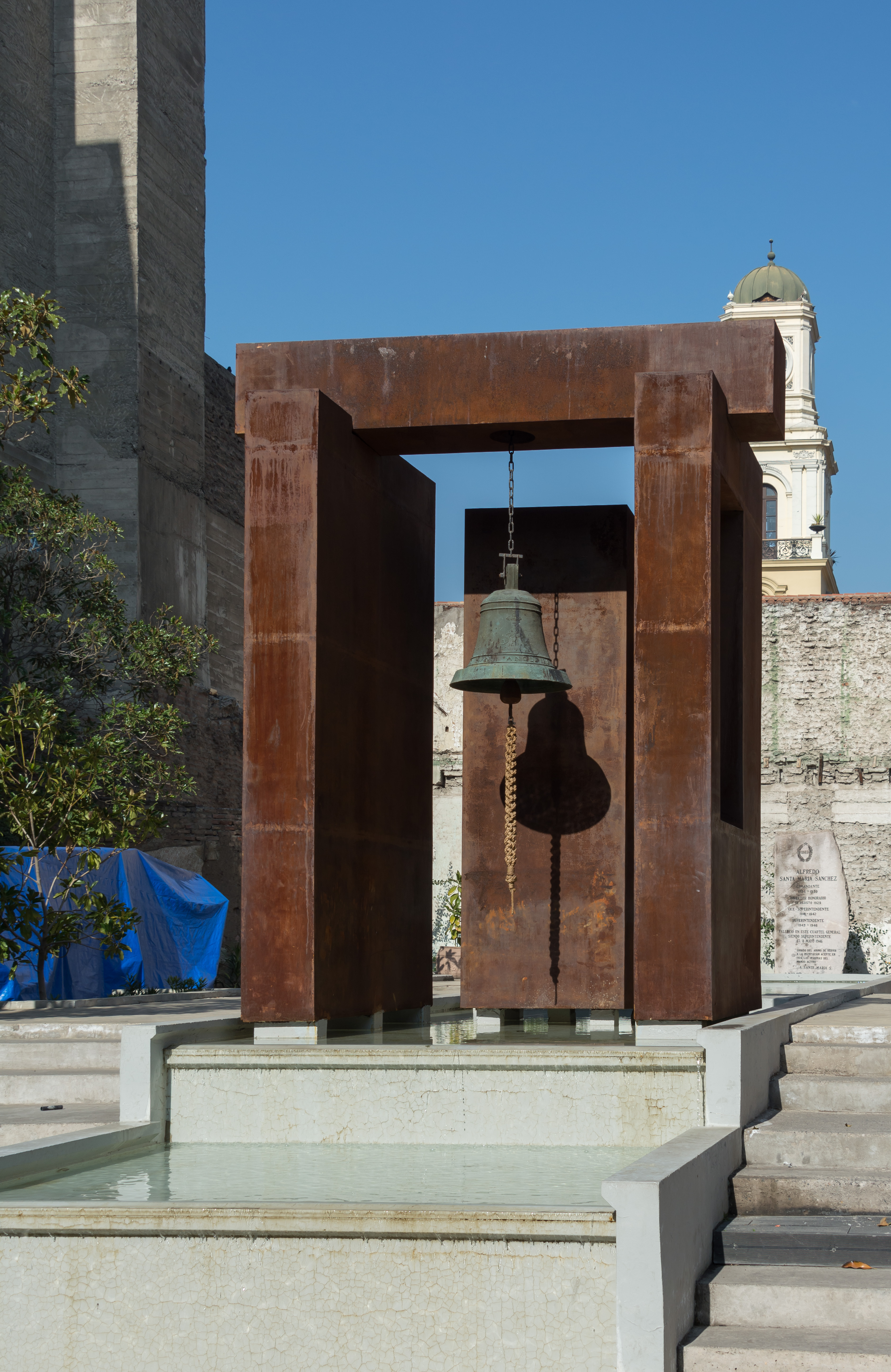 Campana del Museo de Bomberos, Santiago, Región Metropolitana de Santiago, Chile